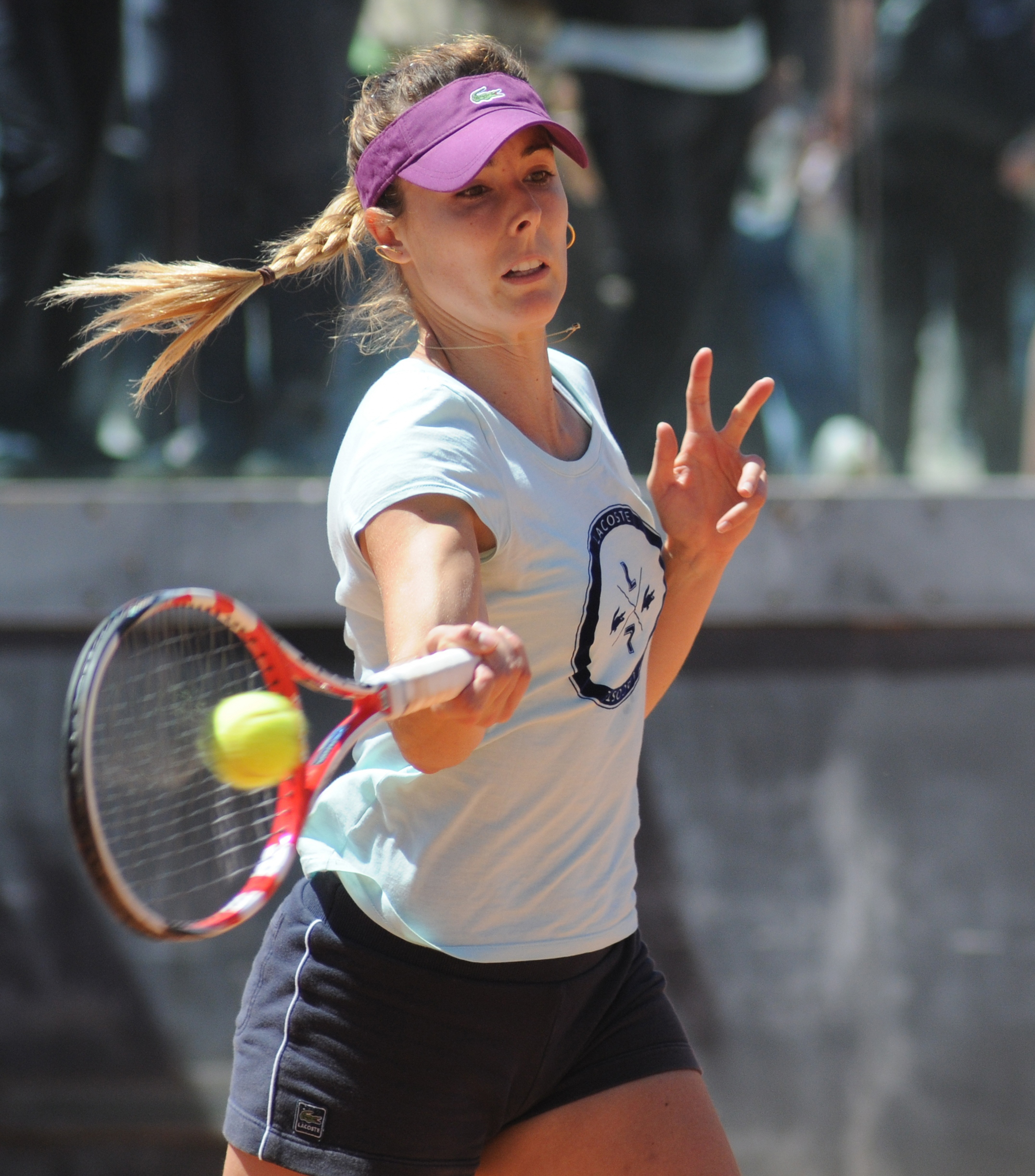 Alizé Cornet at the 2014 Internazionali BNL d'Italia